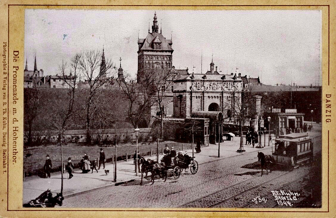 Promenada i Brama Wyżynna w Gdańsku.